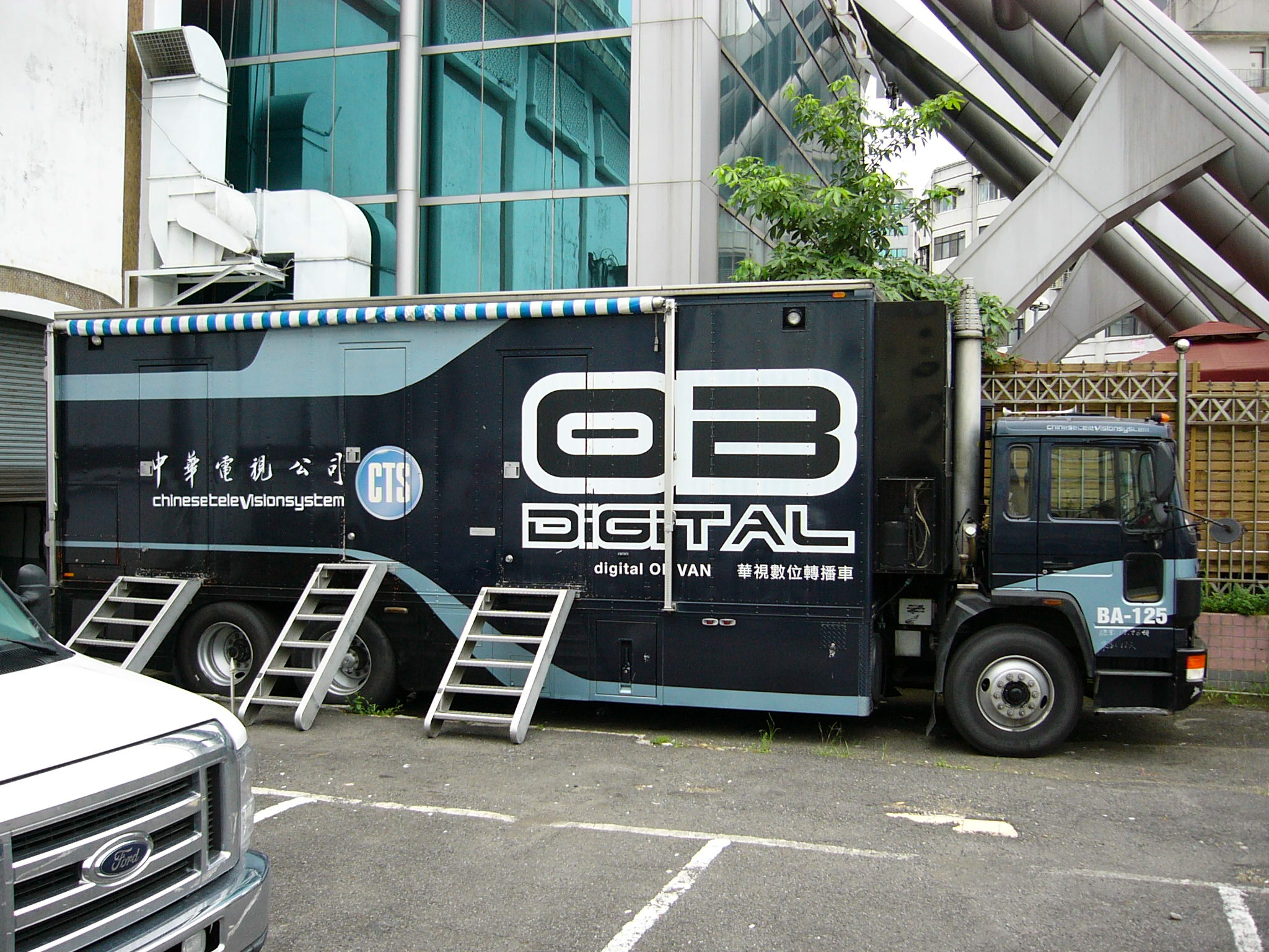 中華電視公司Volvo FE數位轉播車BA-125右側外觀。